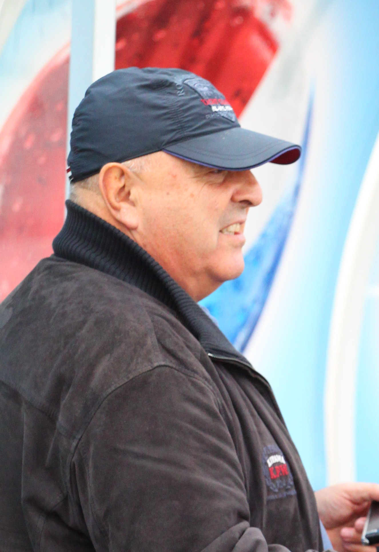 Венцислав Стефанов - председател на УС на ПФК Славия (София).